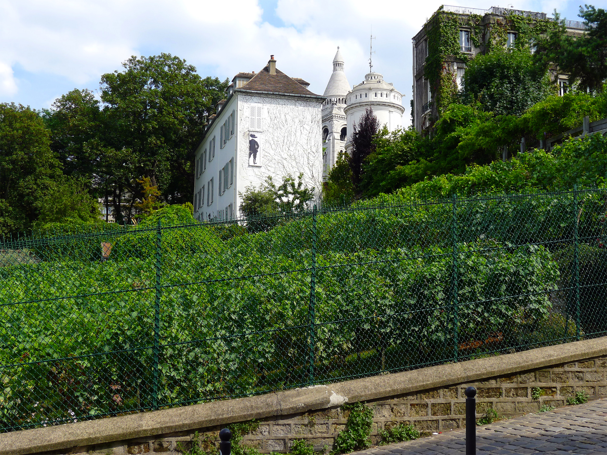 Rue des Saules (vigne de Montmartre) - Paris XVIII